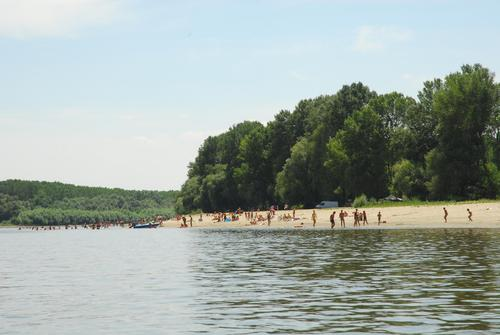 Plaja